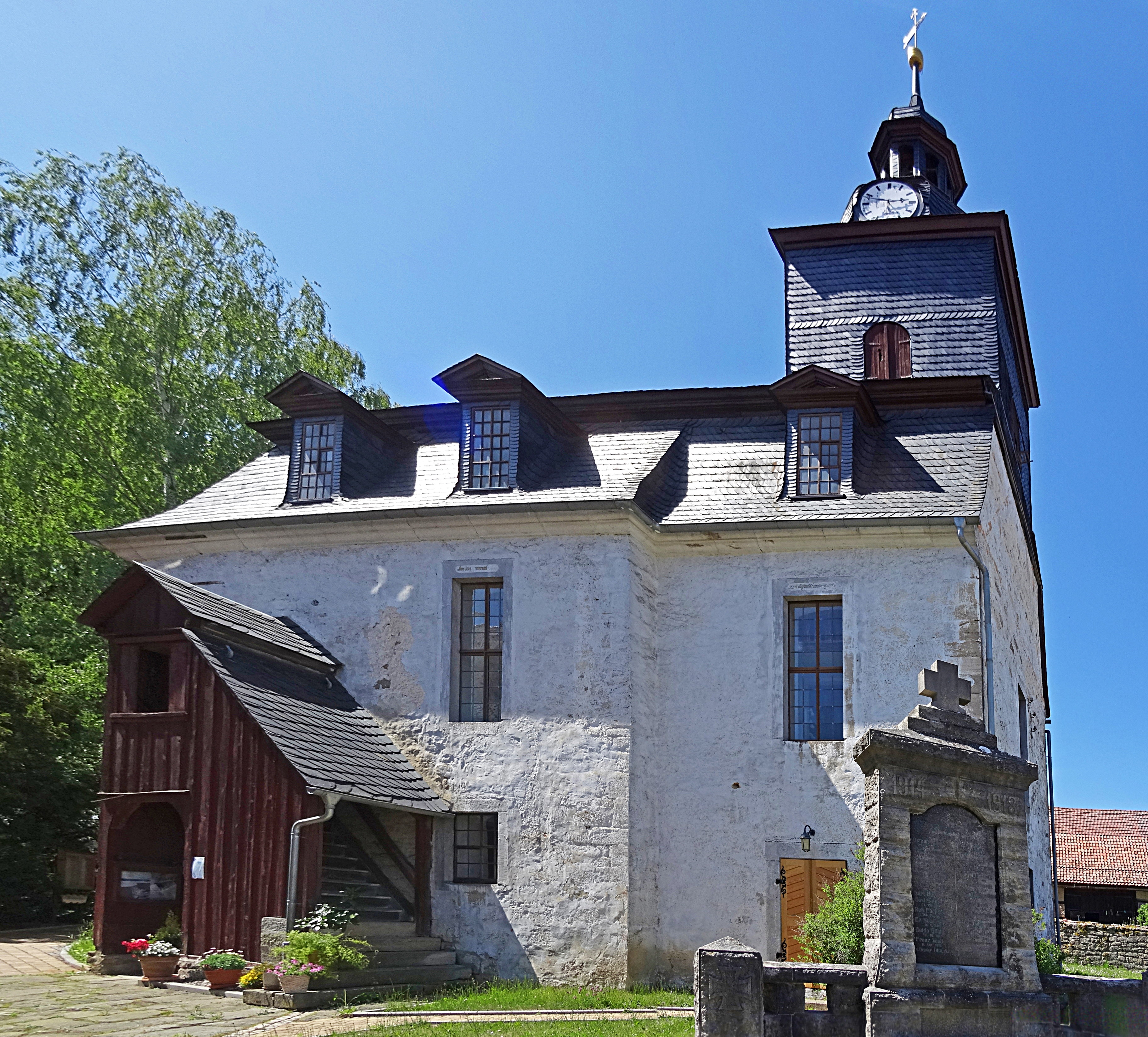 Dorfkirche Heyda von Südosten